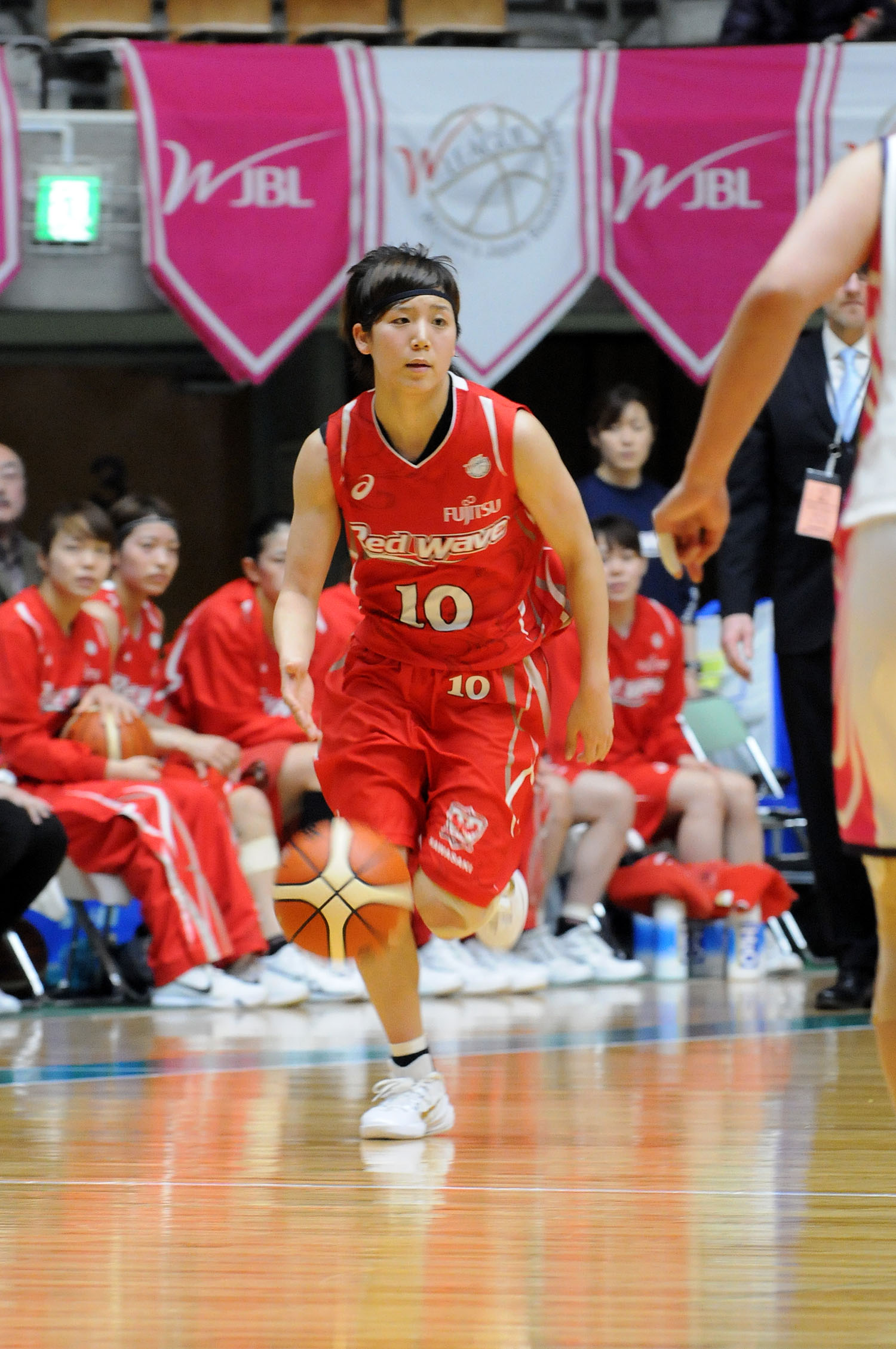 富士通レッドウェーブ、町田瑠唯選手。秋田県立体育館で。